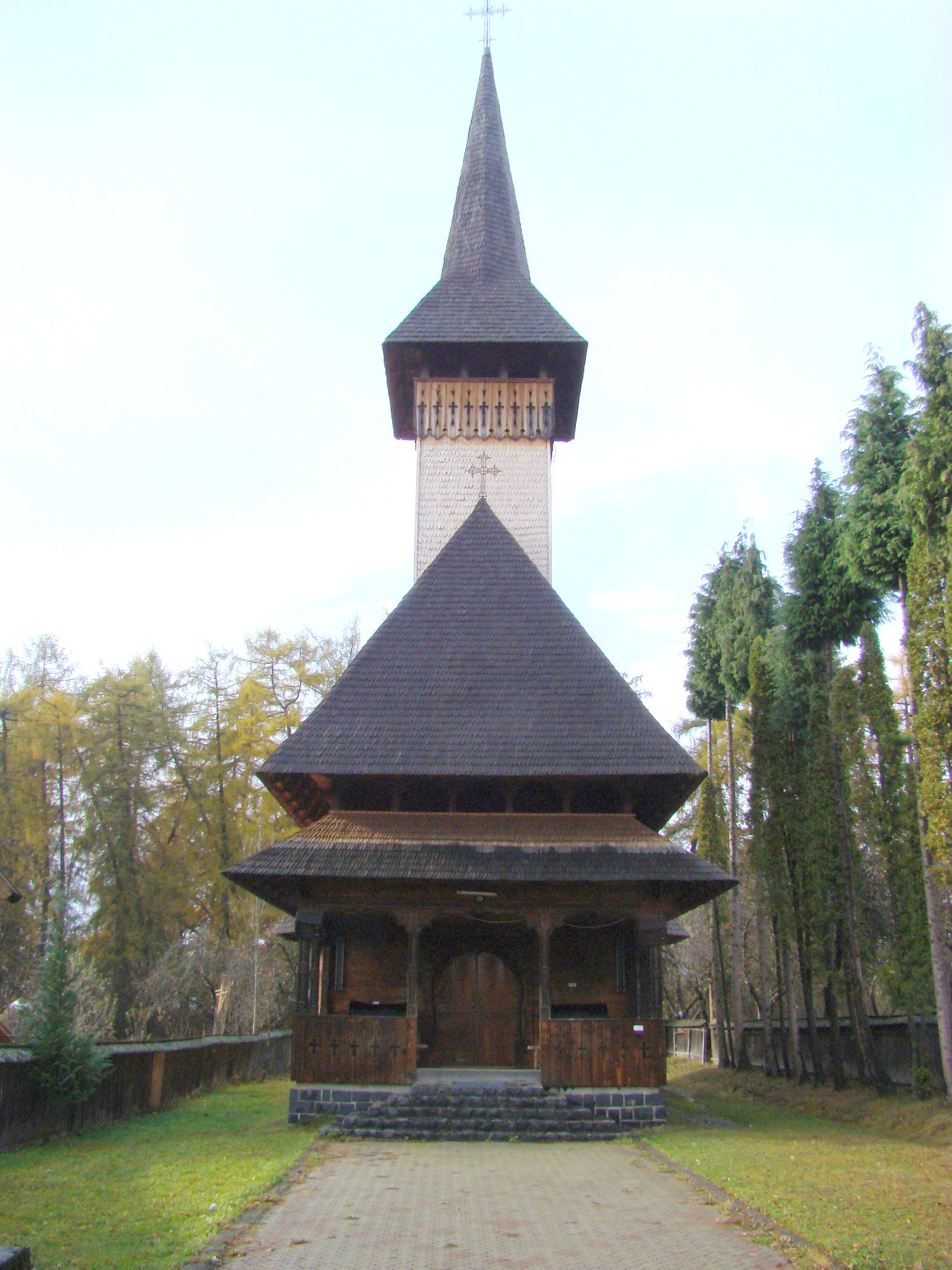 Biserica de lemn din Ocna Șugatag, Maramureș